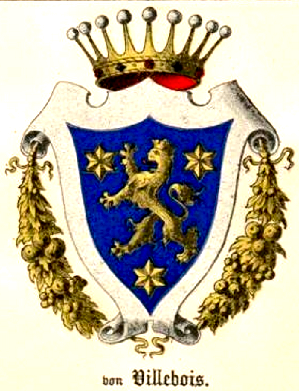 Wappen der (Guillemot) von Villebois